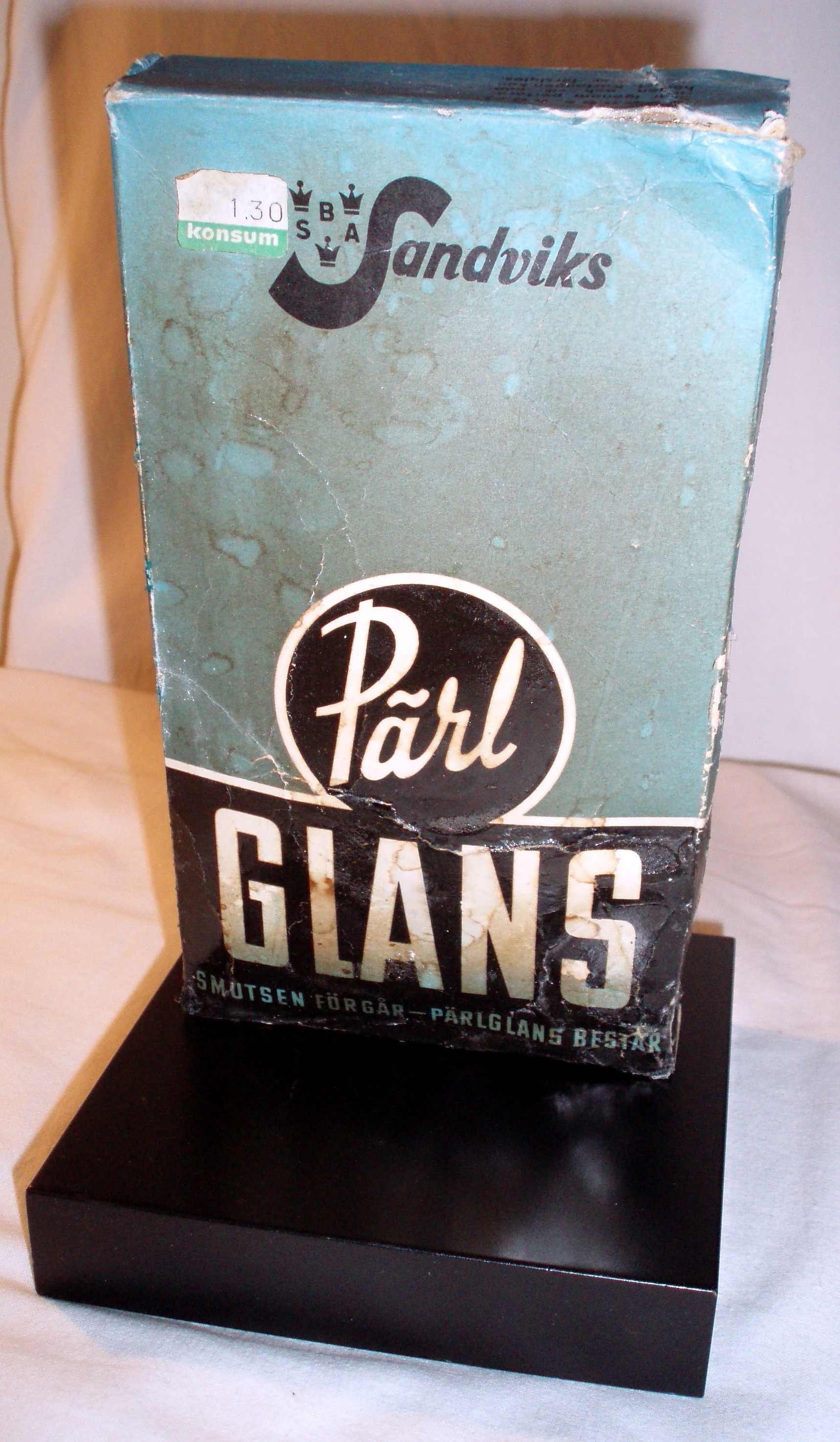 Pärlglans tvättmedel. Photograph: User:Cucumber 8/1 2006.